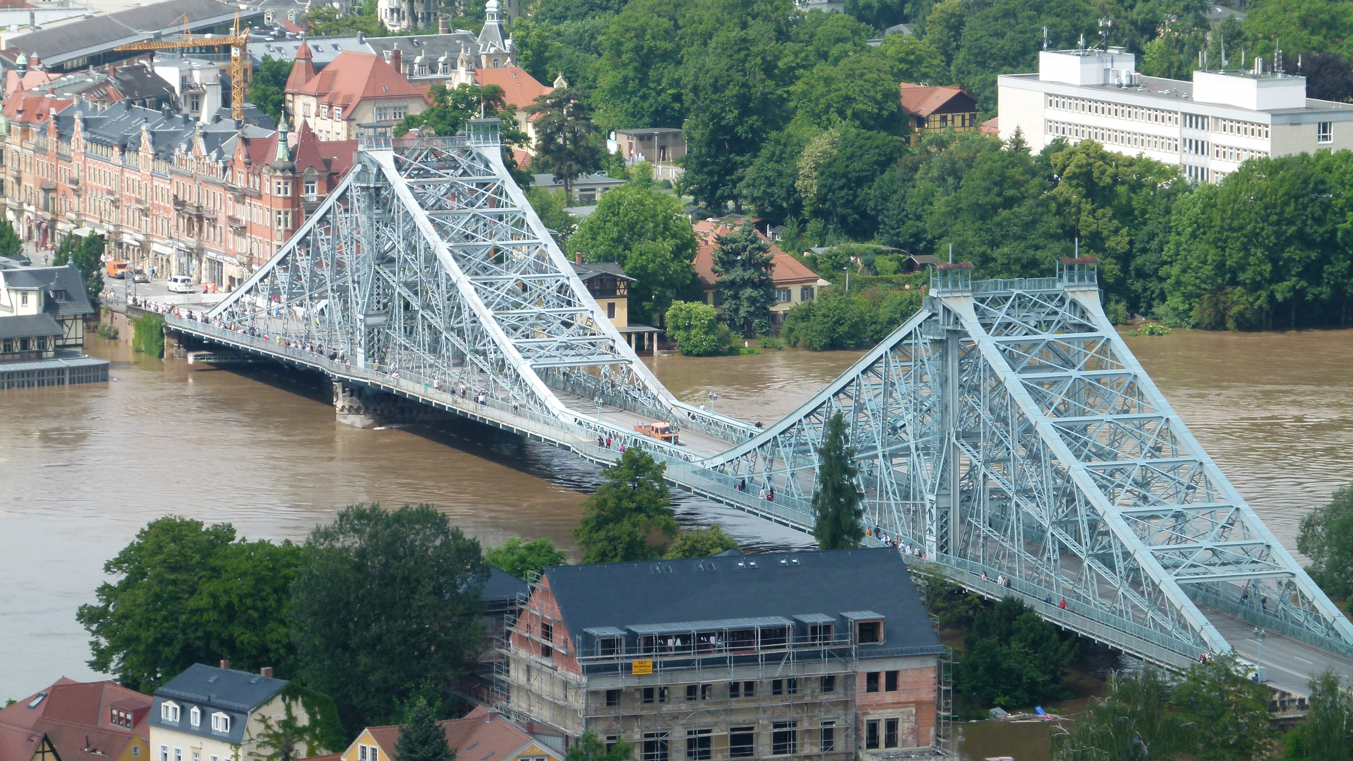 Das Blaue Wunder in Dresden - bedroht vom Hochwasser im Juni 2013